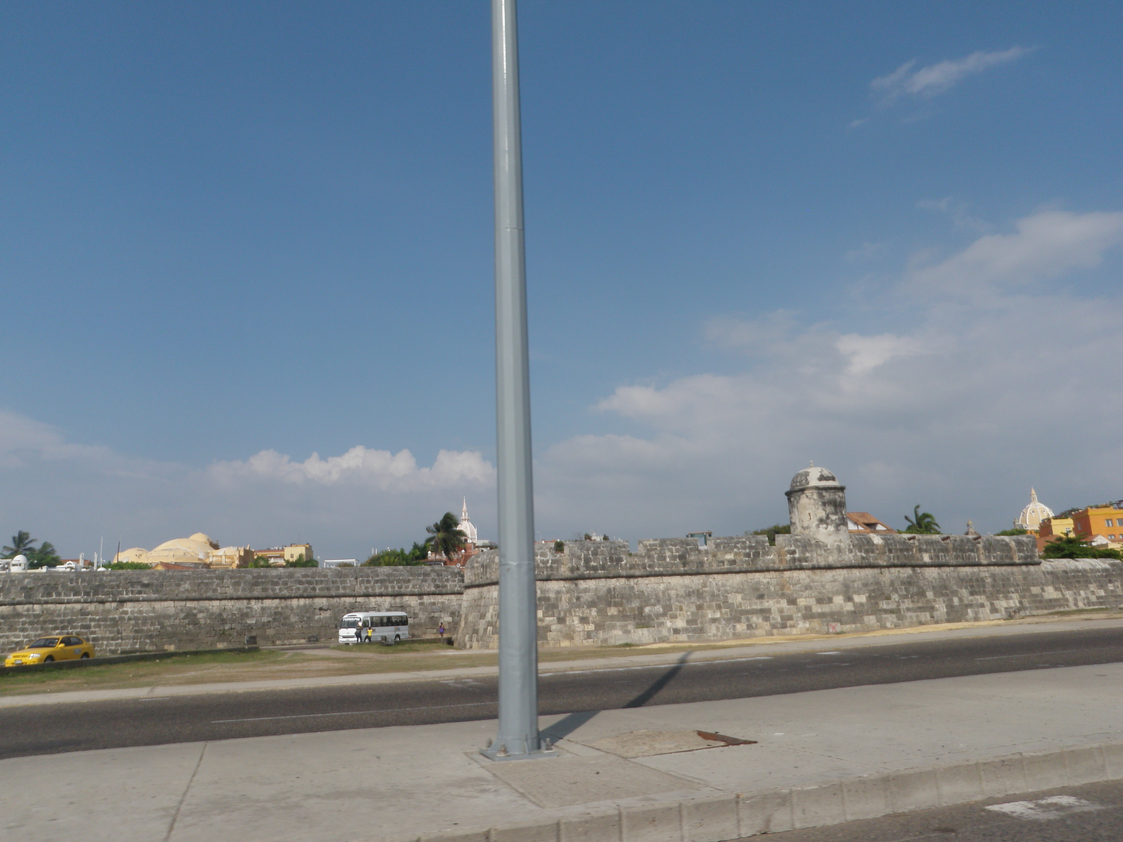 Baluarte de San Ignacio